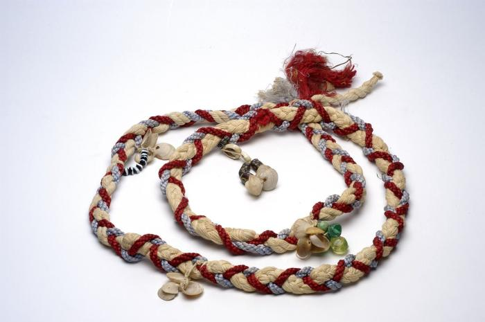 Koord. Gevlochten koord met versiering van glaskralen en kauri schelpjes gedragen bij winti dansen